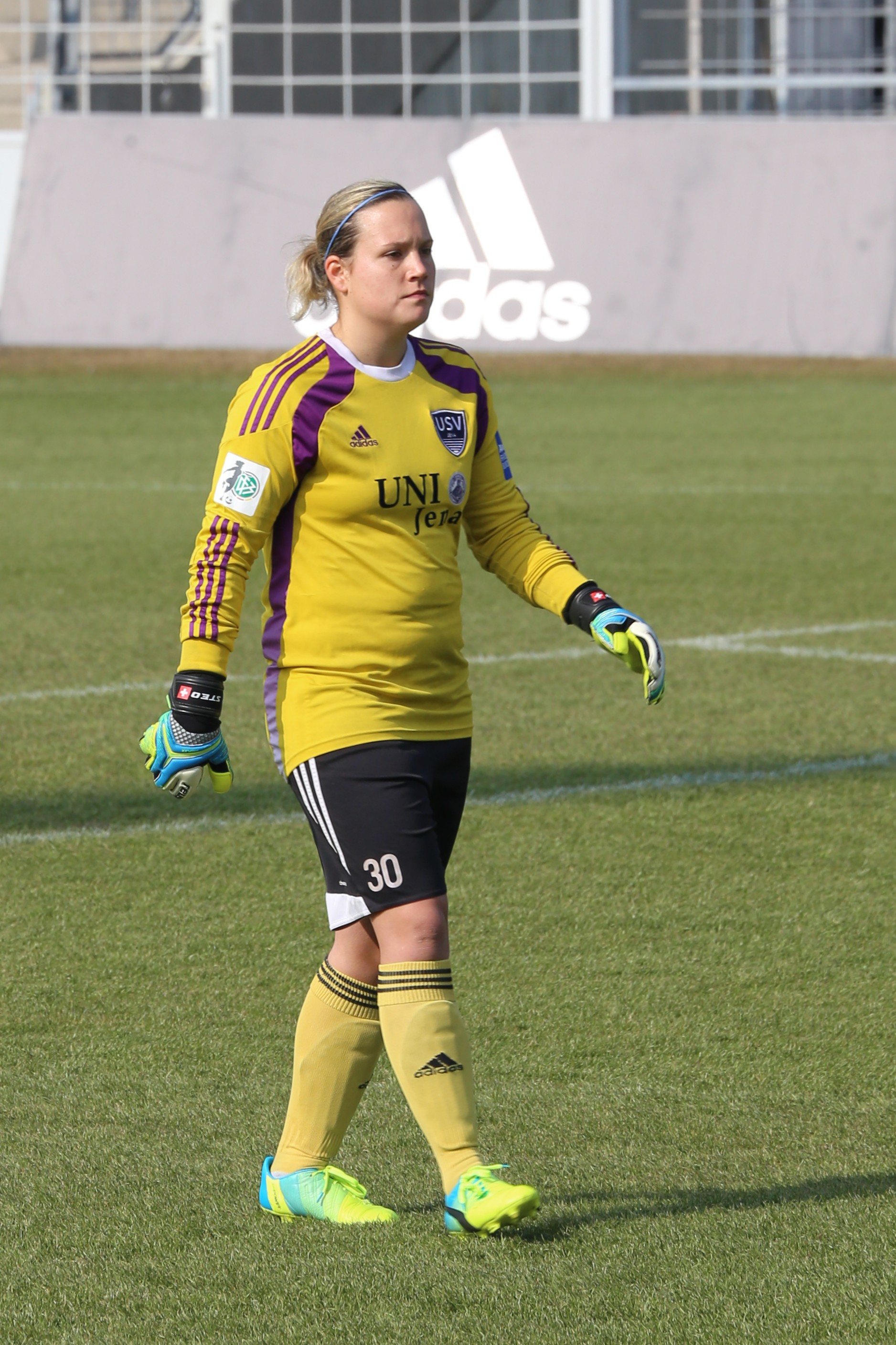 Stenia Michel (FF USV Jena) beim Frauen-Bundesliga-Spiel FC Bayern München gegen FF USV Jena am 19. März 2016 im Stadion an der Grünwalder Straße (Ergebnis war 5:1).